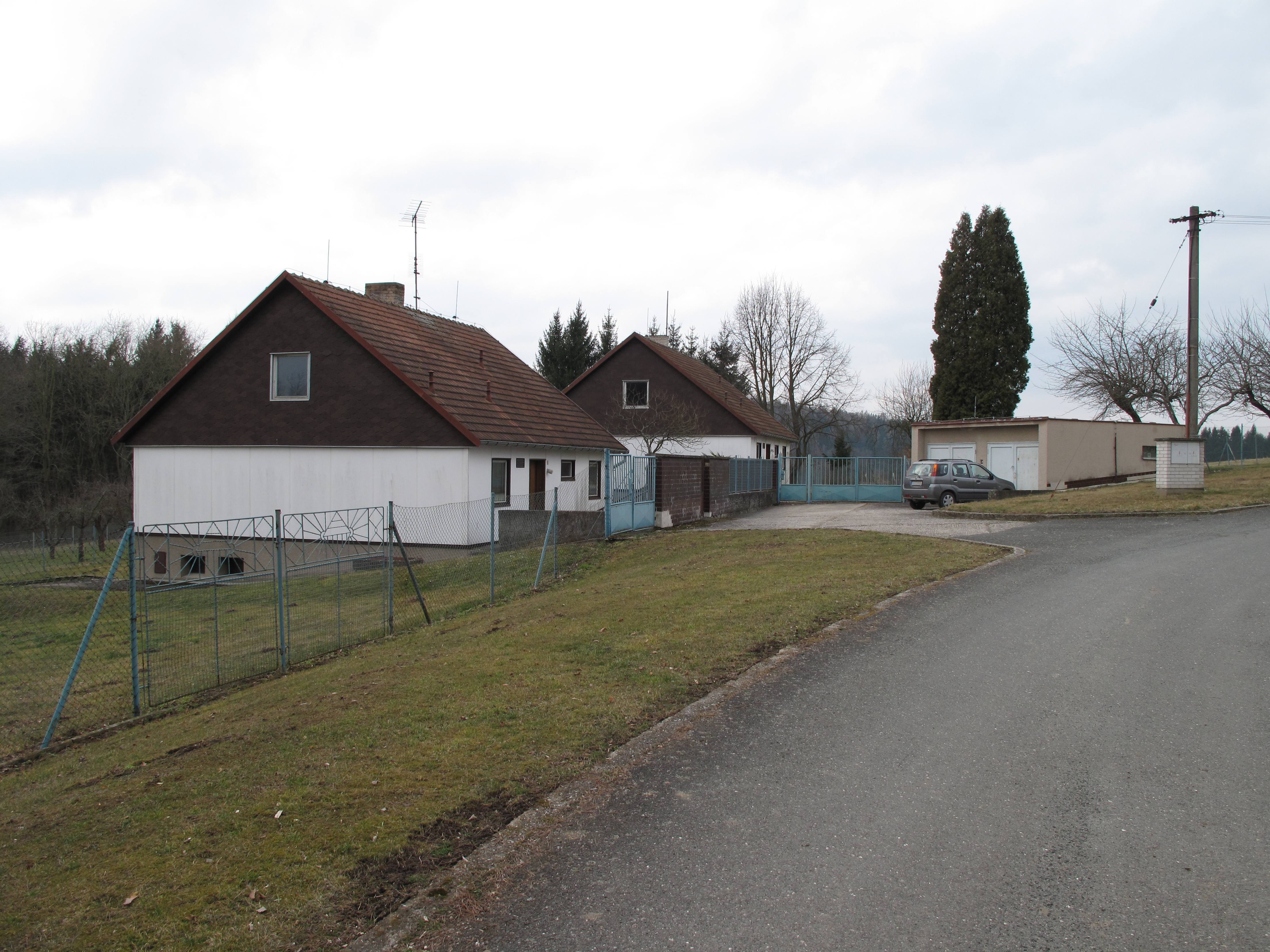 Domy v Budči. Okres Havlíčkův Brod, Česká republika.